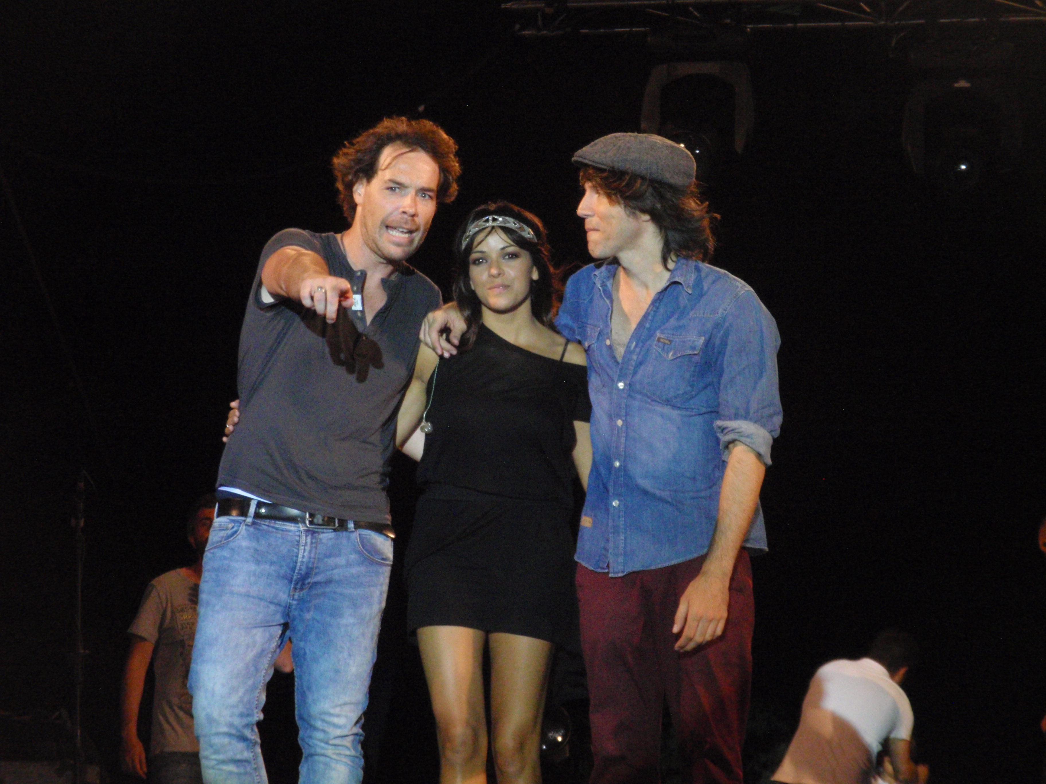 Actuación del grupo El sueño de Morfeo en San Lorenzo de El Escorial el día 10 de agosto de 2012.